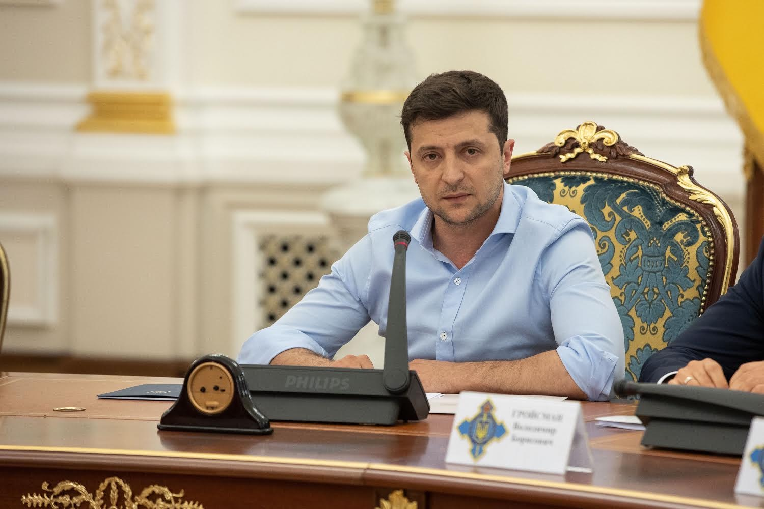 Президент Украины Владимир Зеленский провел совещание с участием членов Совета национальной безопасности и обороны Украины, посвященное энергетической безопасности.